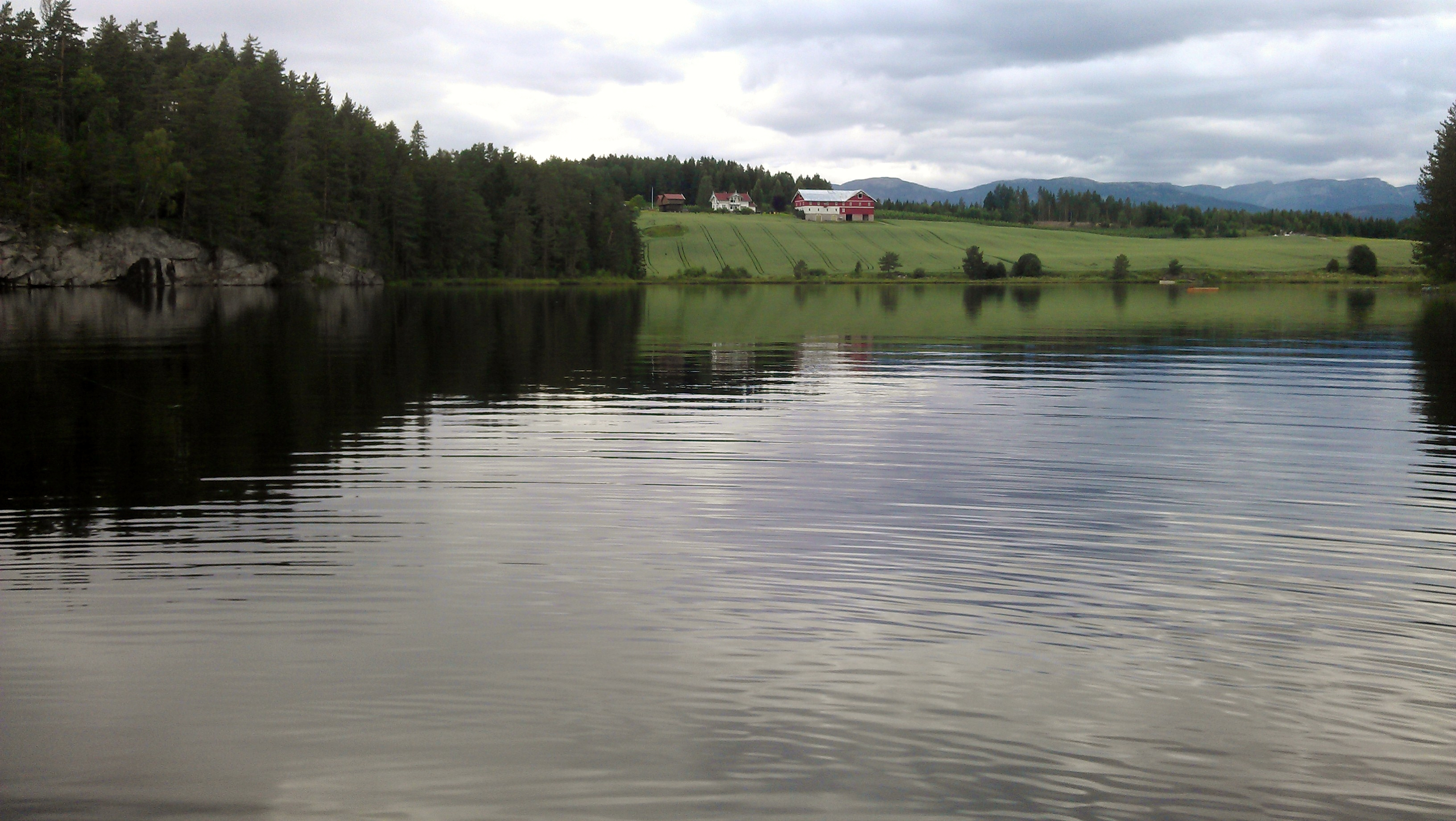 Børtetjønn i Nome kommune.